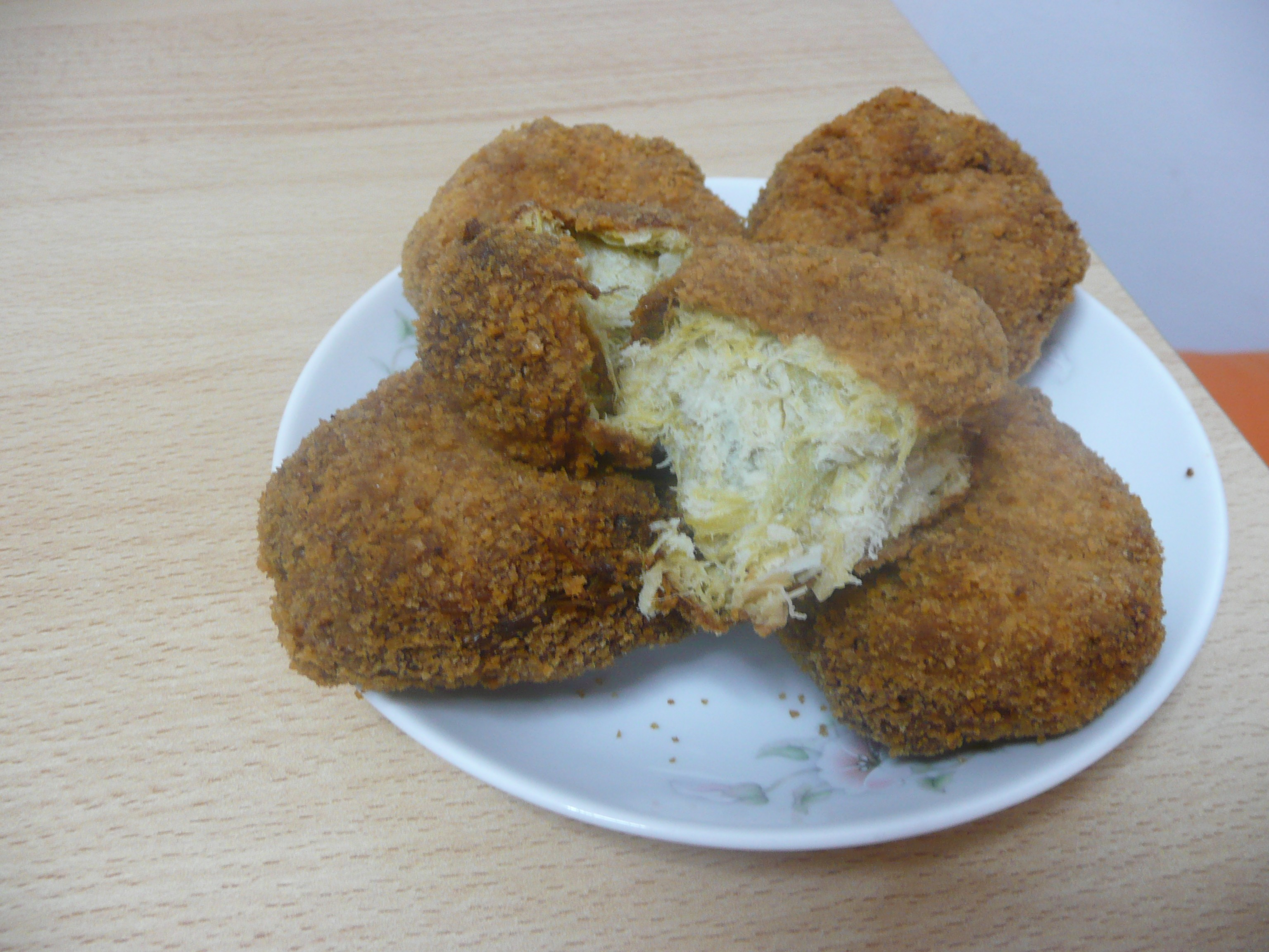 Ladino: keftikas de prasa